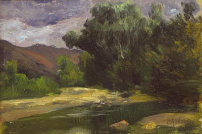 paisatge amb bosc frondós i amb núvols de tempesta, muntanyes de fons.